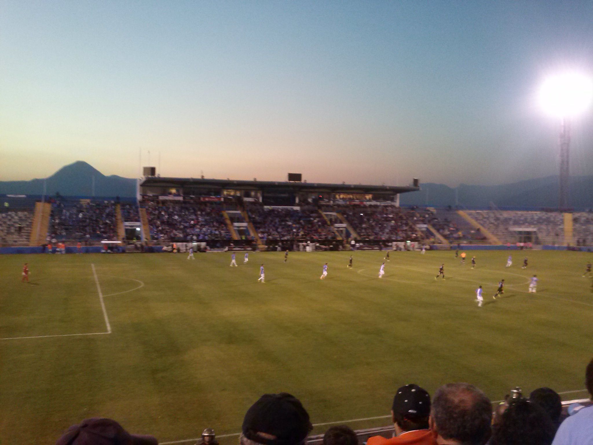 San Carlos de Apoquindo